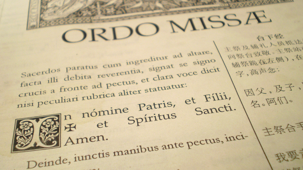 Missalis Romani 1962 - Ordo Missae